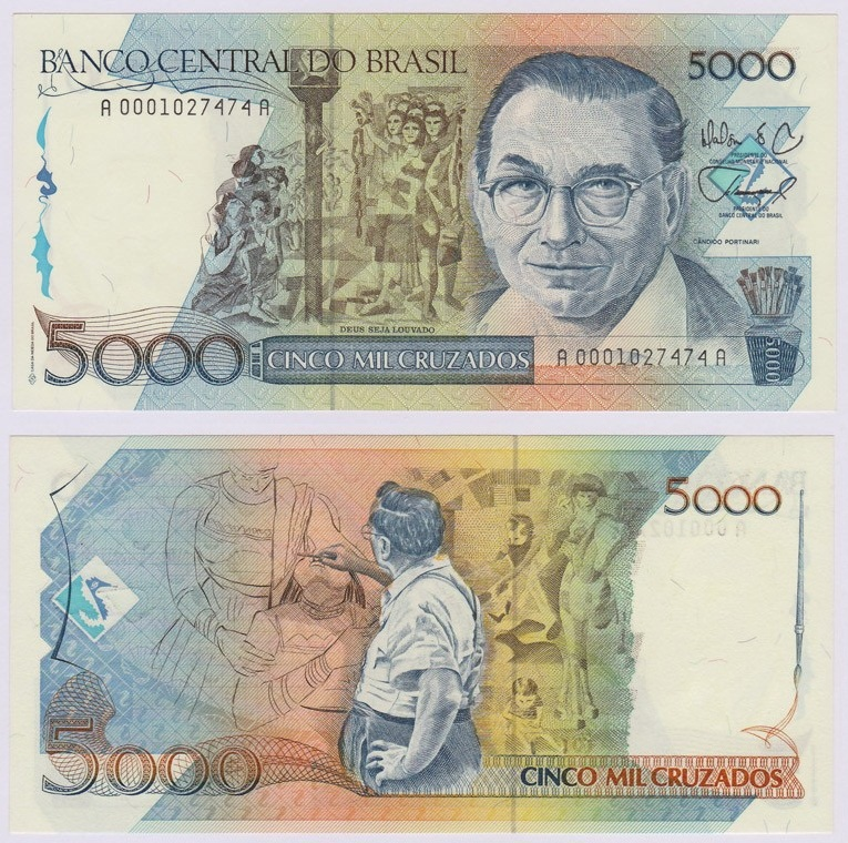 Cédula de 5000 cruzados com a efígie de Cândido Portinari.